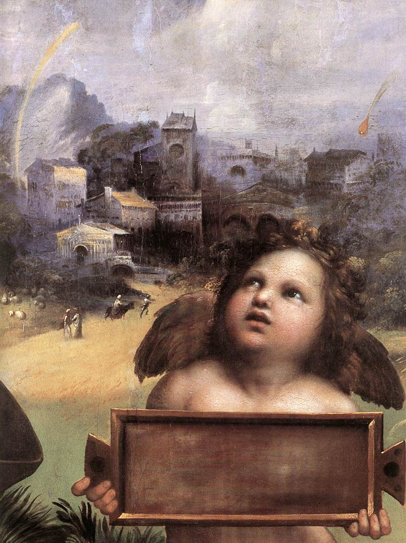 detail